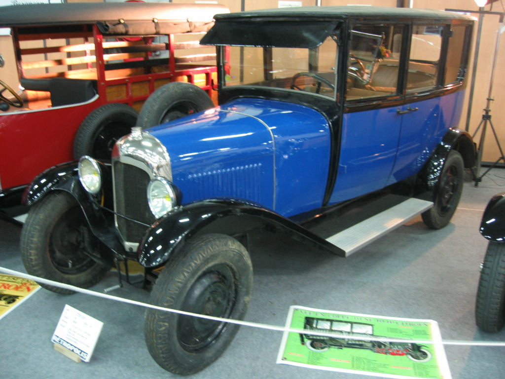 Citroen B10